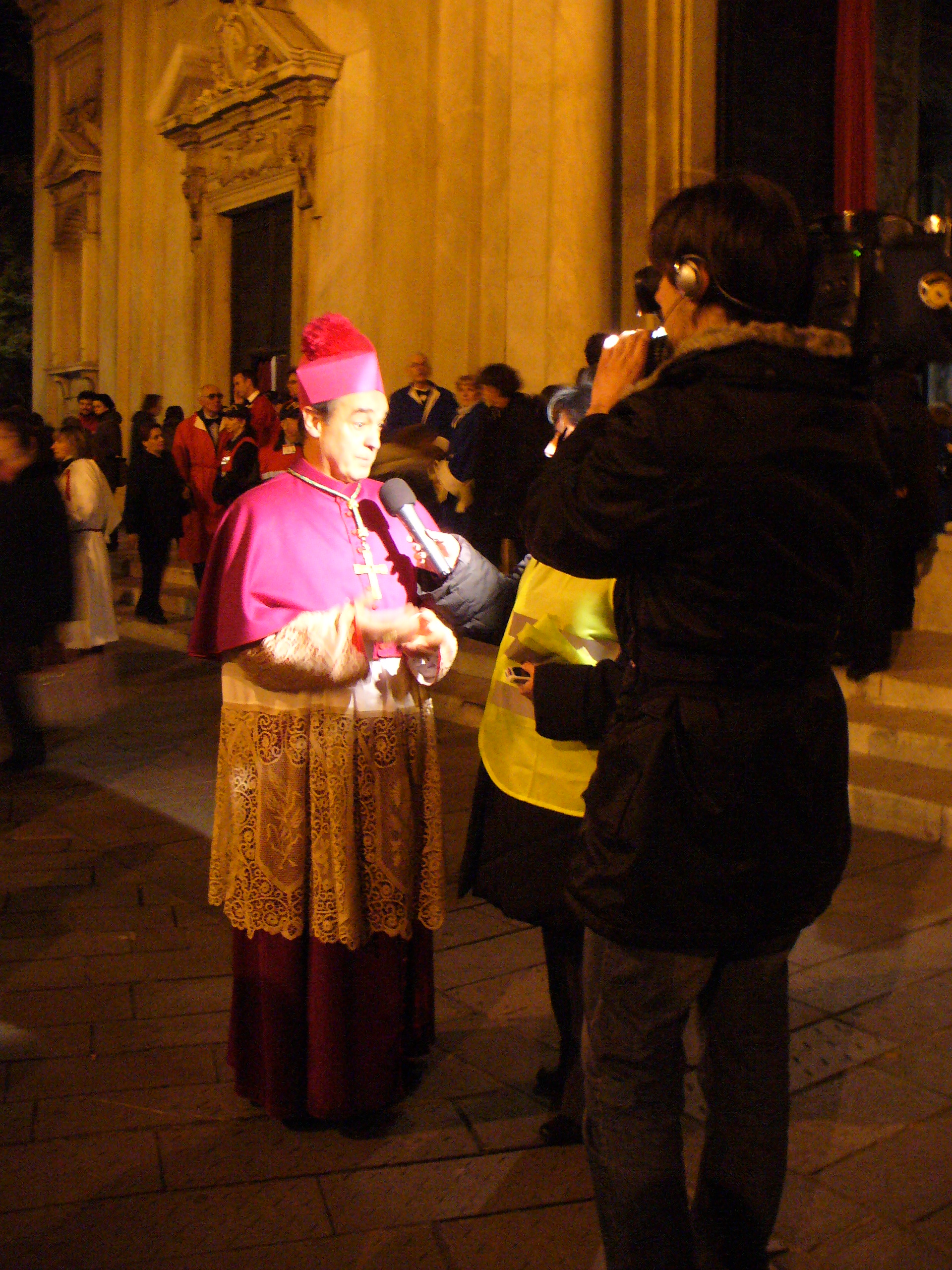 il vesvovo della diocesi Savona-Noli Vittorio Lupi durante la processione del venerdì santo si savona